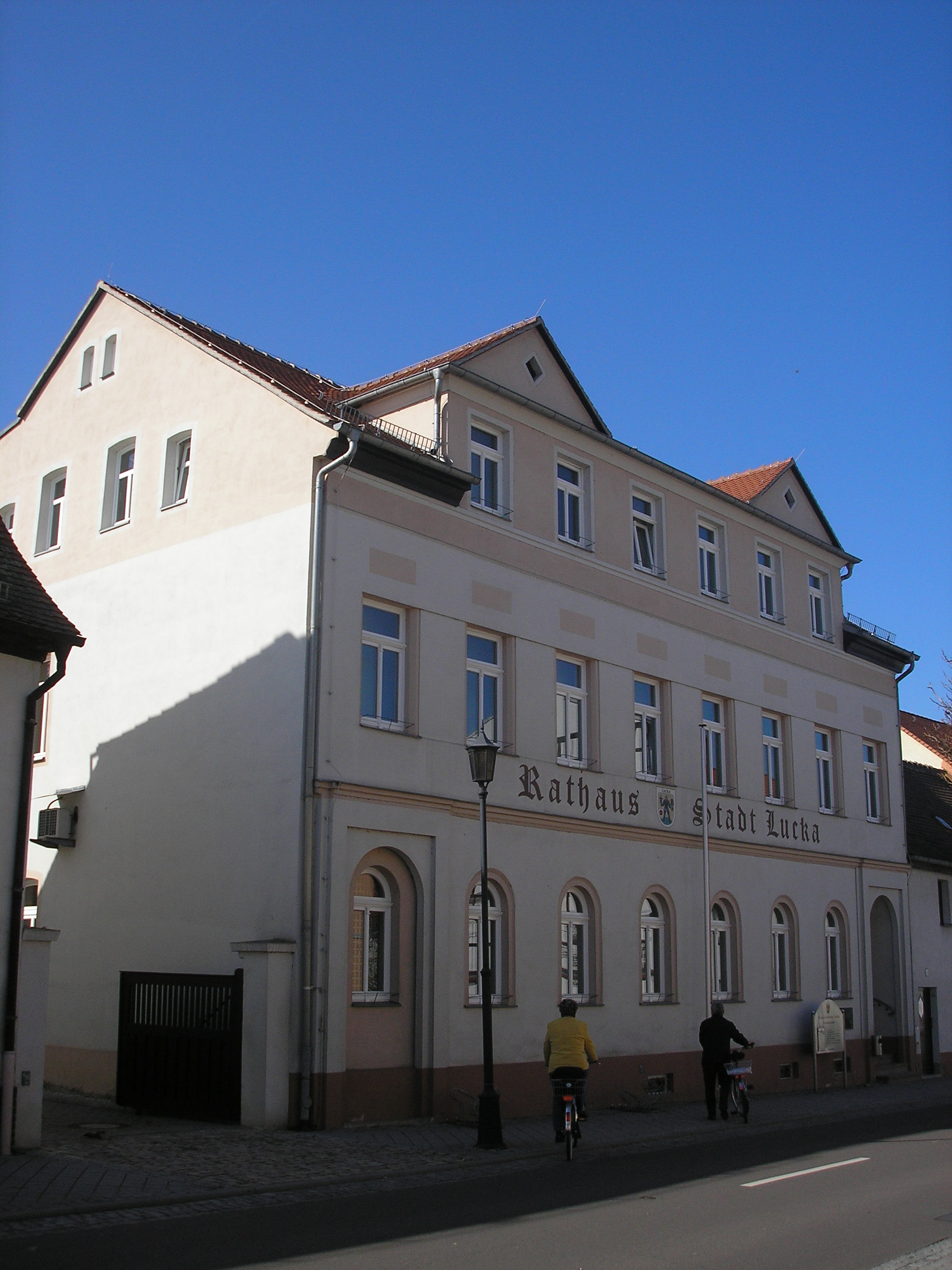 Das Rathaus in Lucka (Thüringen).